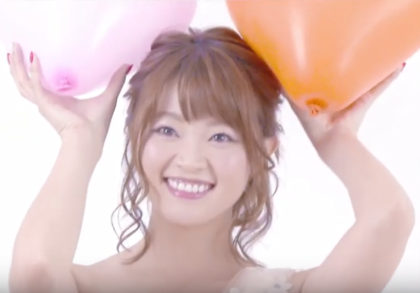 平林あずみです。